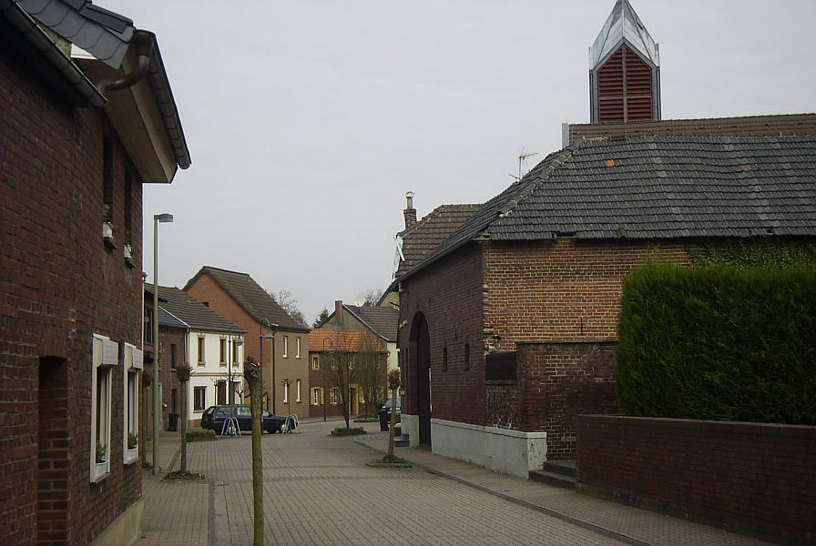 Summary Bildbeschreibung: Erkelenz-Granterath Quelle: eigenes Foto Fotograf/Zeichner: bodoklecksel 19:26, 20. Apr 2006 (CEST) Datum: April 2006 Sonstiges: ...